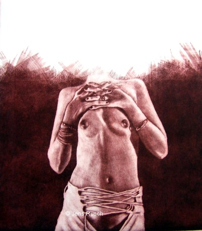 Mezzotinto-Schabkunst